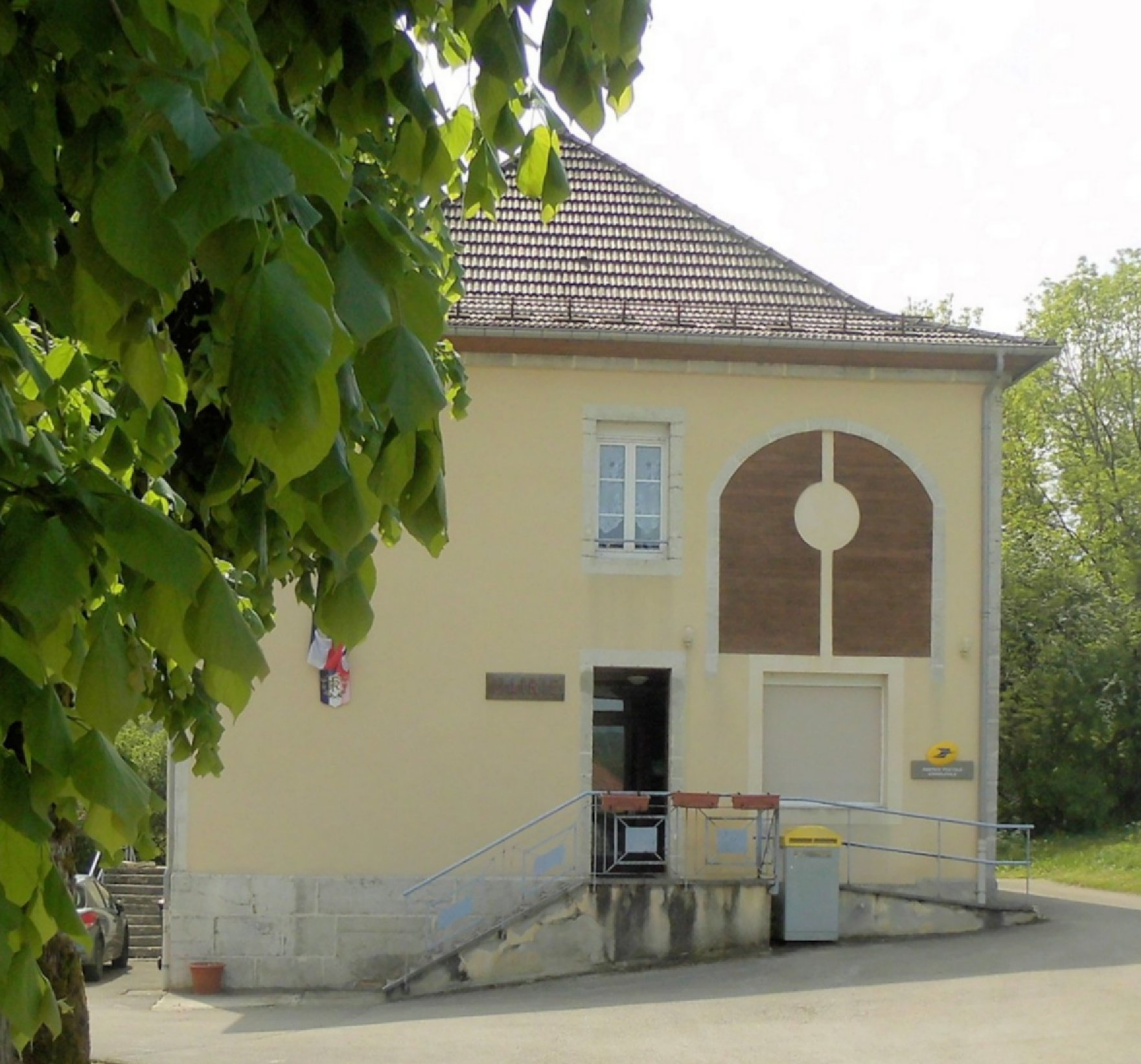 La mairie d'Indevillers